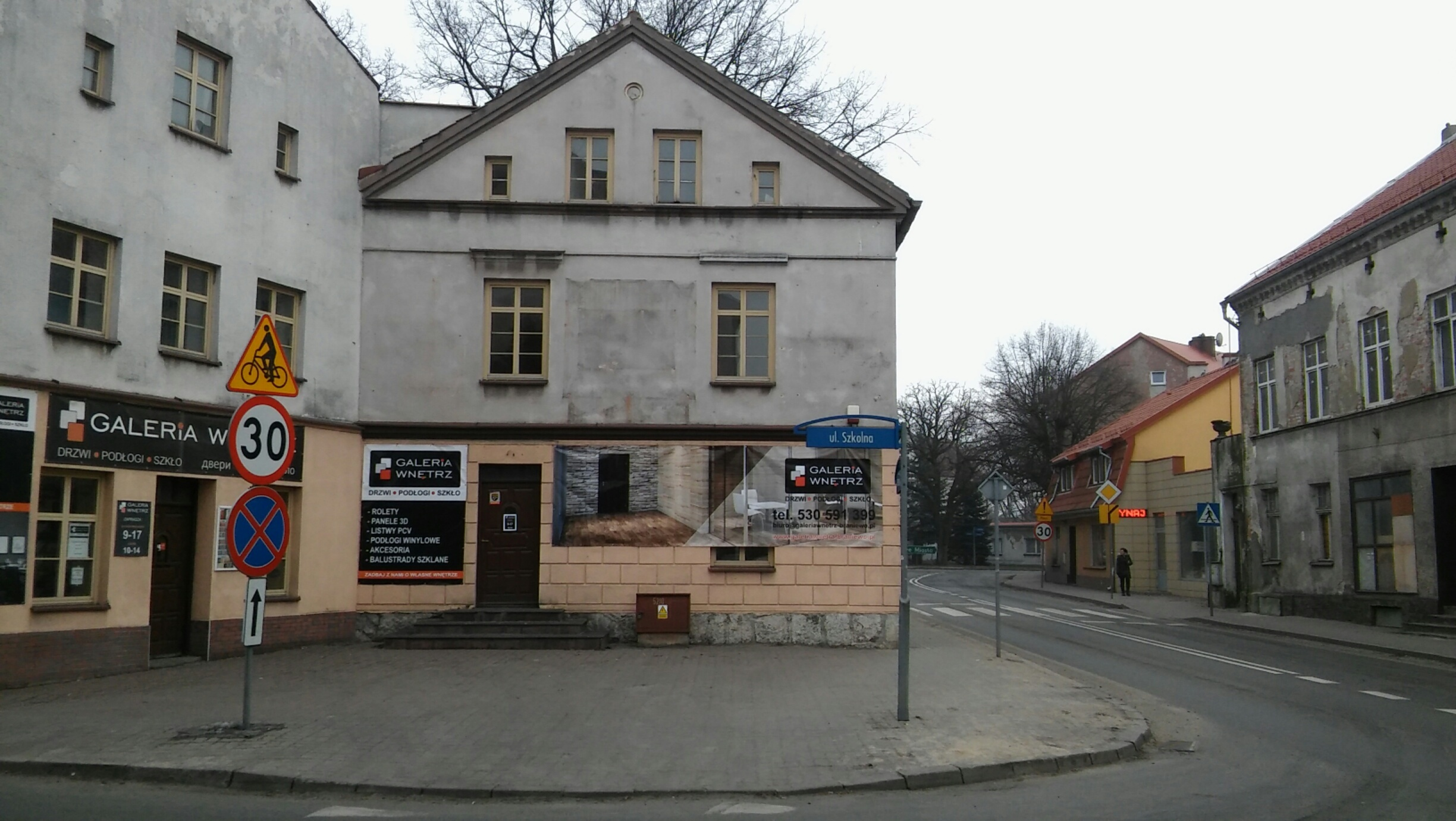 IKAT Braniewo Kościuszki